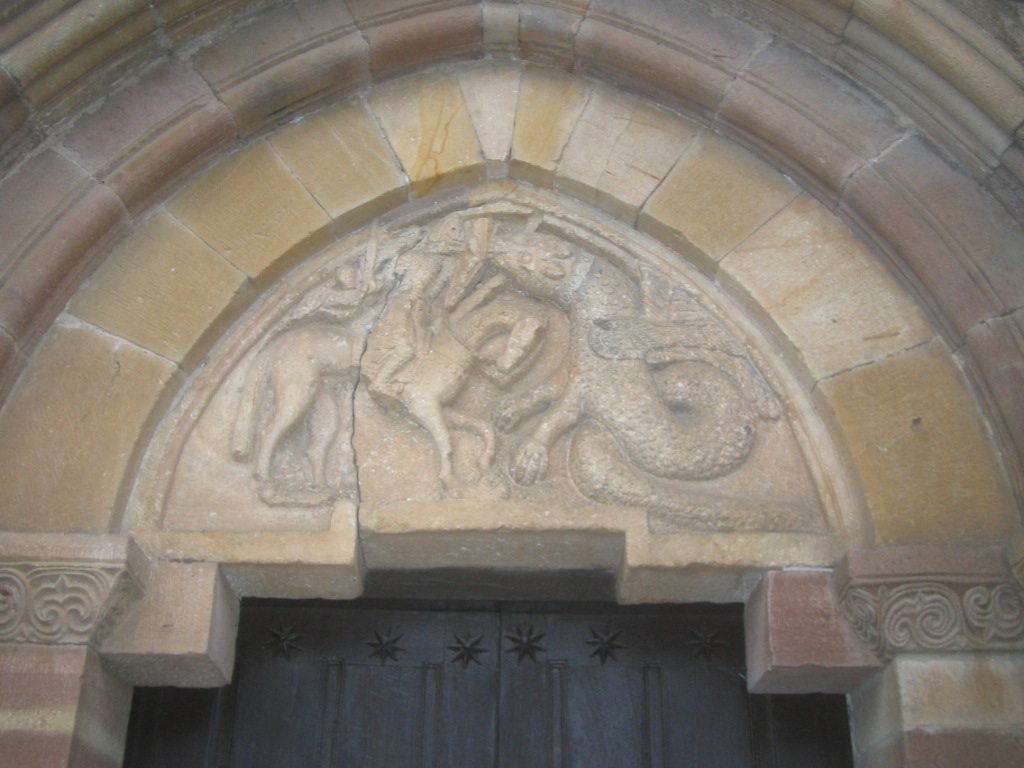 Iglesia de Santa María, en Yermo, Cantabria, España. Detalle del tímpano